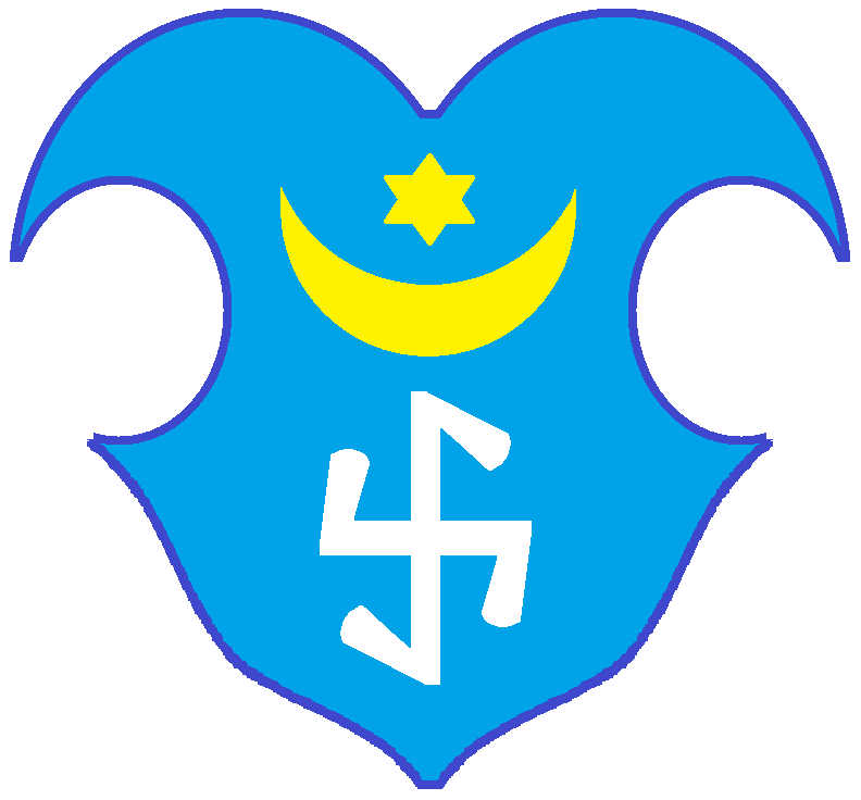 Герб "Єльці I"